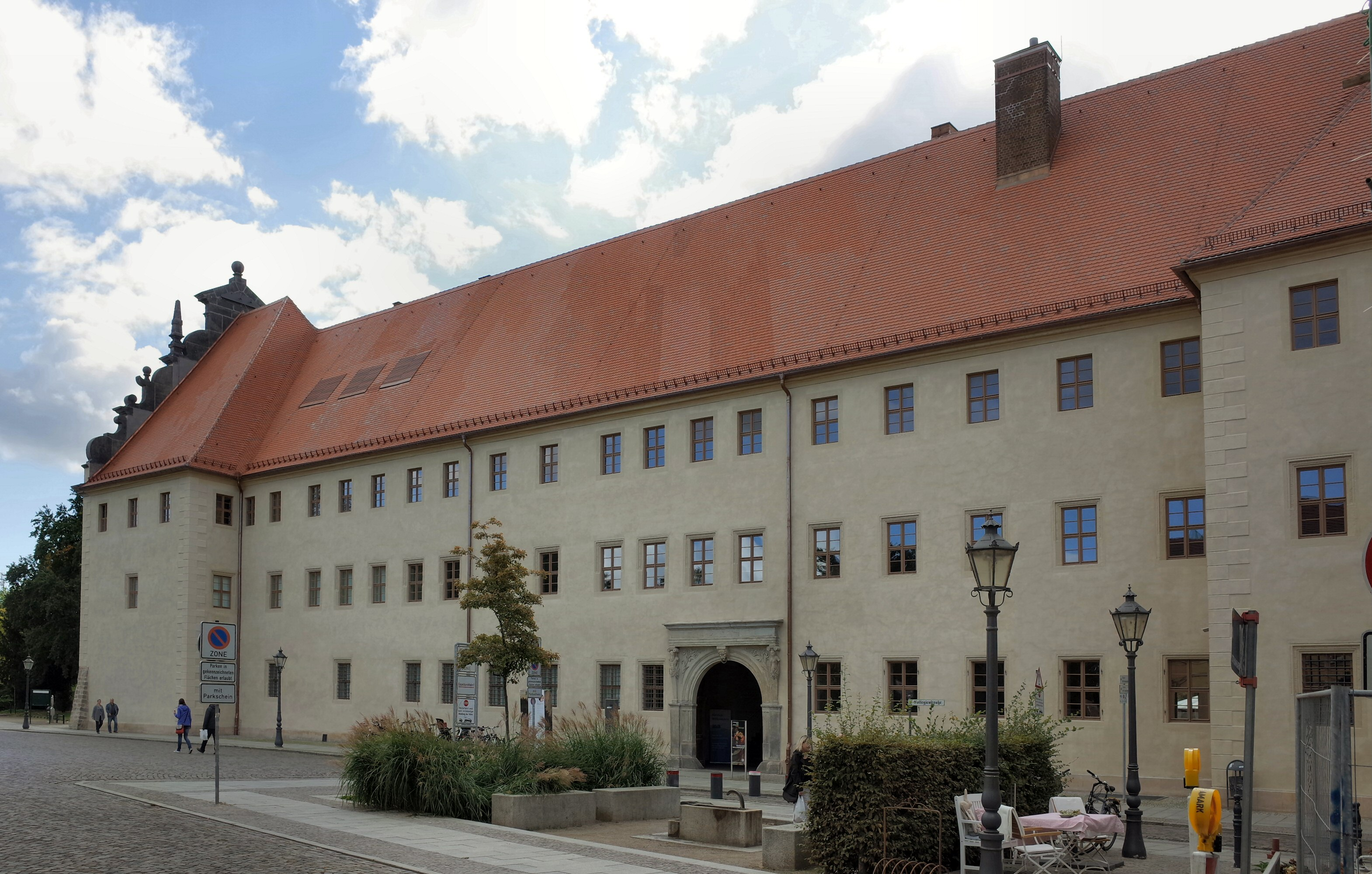 Lutherstadt Wittenberg, Collegienstraße 54, Universitätsgebäude (Baudenkmal im Denkmalverzeichniss Sachsen-Anhalt, Erfassungsnummer: 094 35882 000 000 000 000 [1])